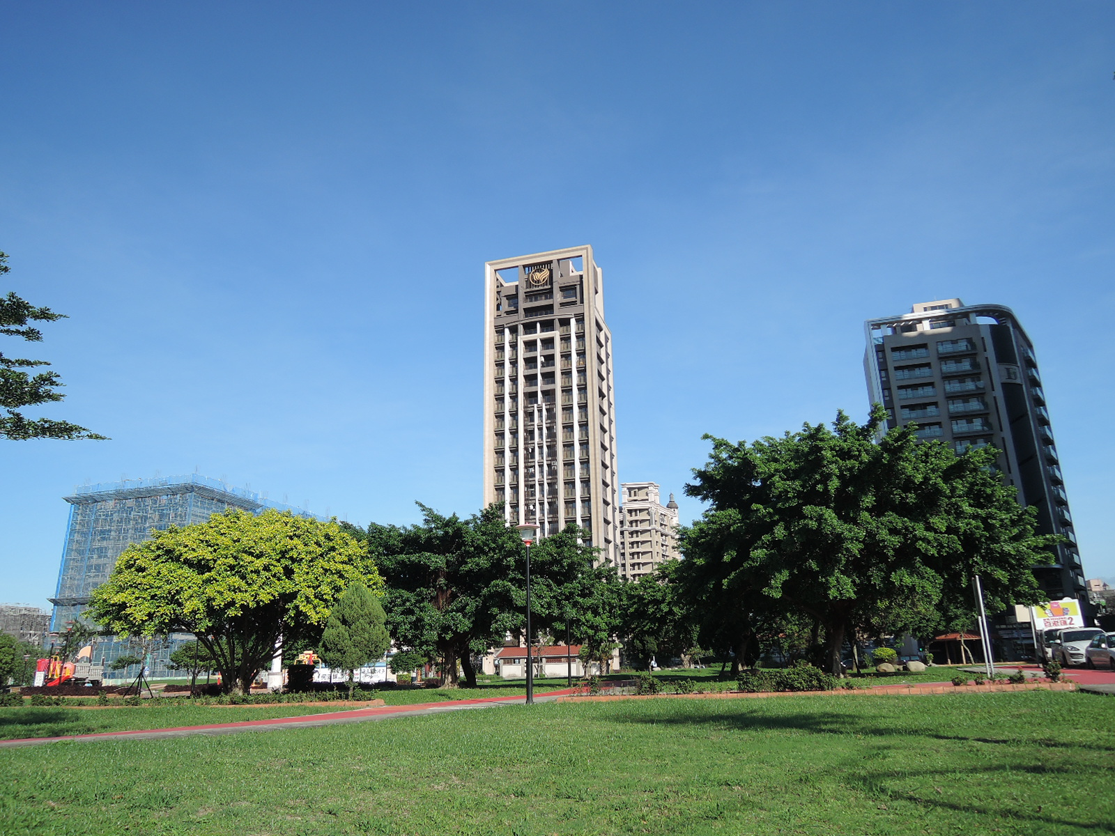 中文（台灣）: 逸極3；攝於八德擴大重劃區(八德擴大都市計畫)。